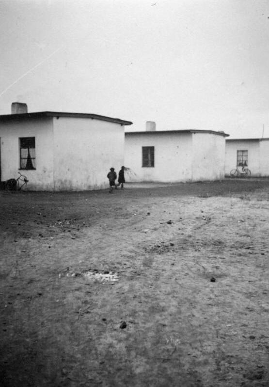 Düsseldorf 37/38 [Zigeunerlager]